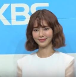 KBS 1TV 일일연속극 '여름아 부탁해' 제작발표회가 25일 오후 라마다 서울 신도림 그랜드볼룸에서 열렸다.